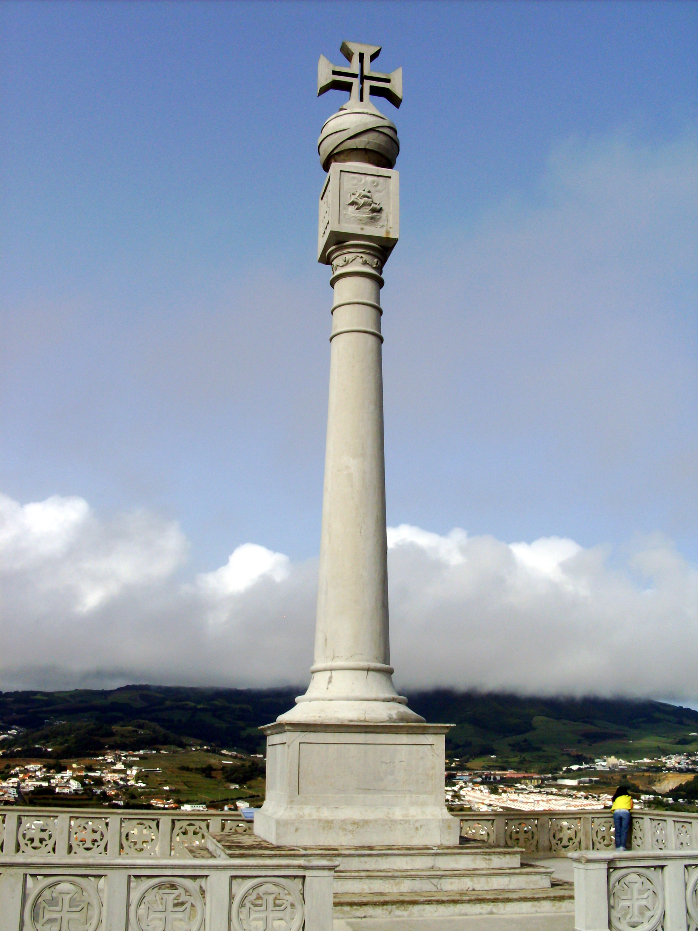 Miradouro do Pico das Cruzinhas, Angra do Heroísmo, Ilha Terceira, Açores: monumento ao V Centenário do Povoamento da Terceira (1432-1932).